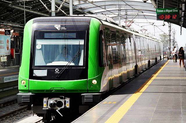 Linea 1 del Metro de Lima